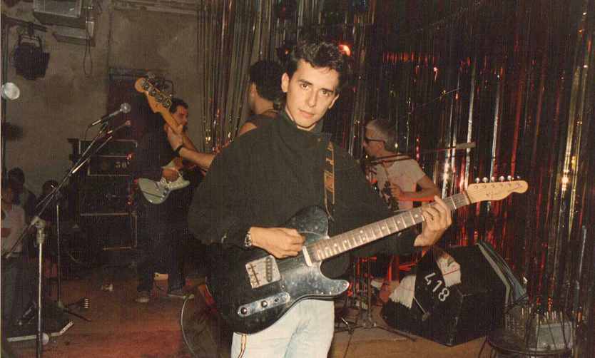 Sergio Nacif tocando en Alphonso S´entrega